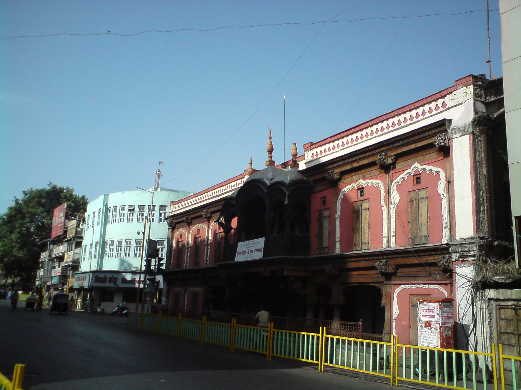 Vishrambaug Wada on Bajirao road, Pune